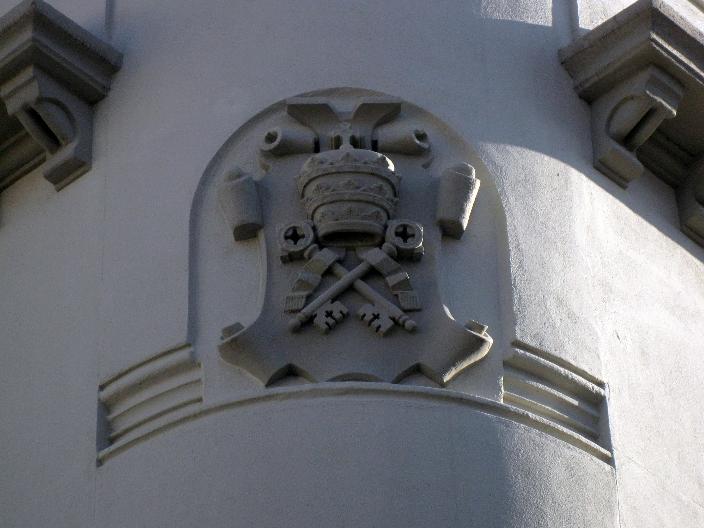 Antic ajuntament de Sant Pere, actualment local social del barri, al carrer Major de Sant Pere núm. 20 (Terrassa). Edifici modernista historicista de començament del segle XX. A la cantonada arrodonida hi figura l'escut de l'antic municipi.